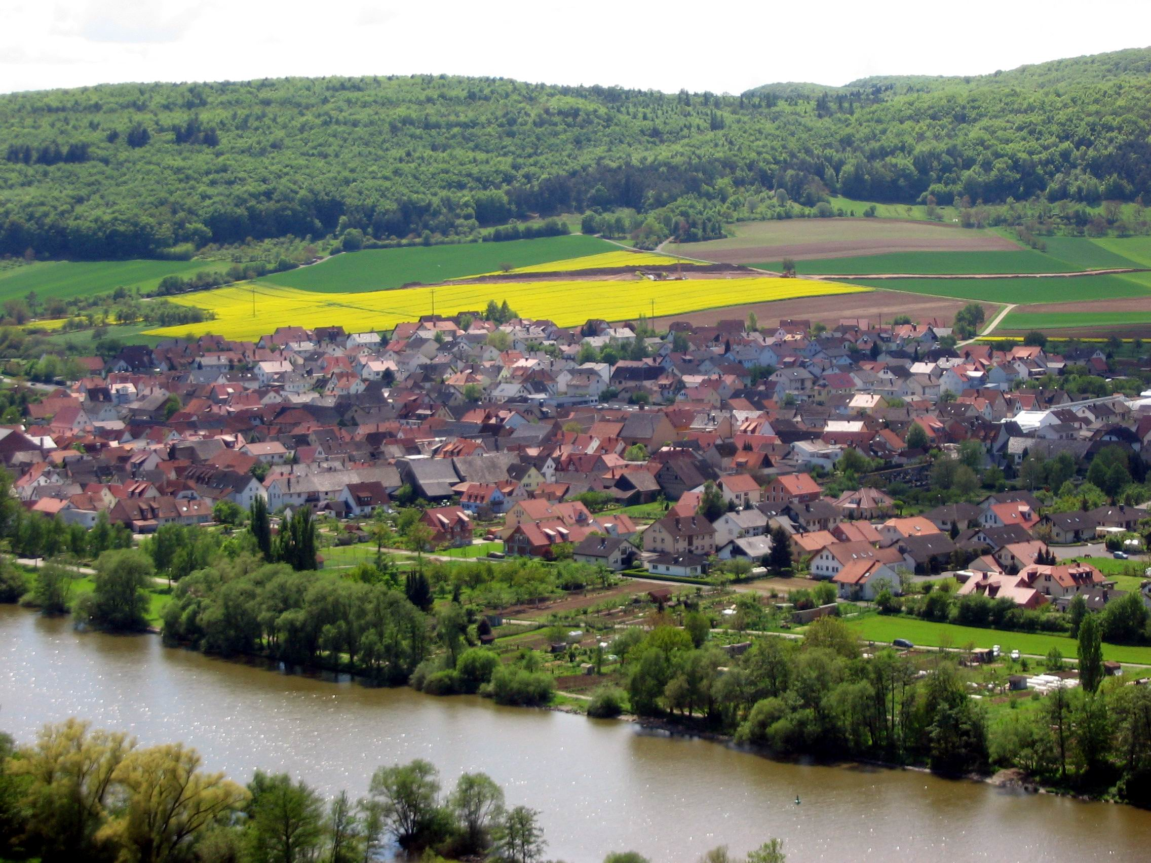 selber fotografiert